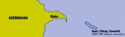 карта с указанным местонахождением месторождения Азери_чераг_гюнешли